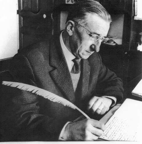 Norbert Casteret dans sa résidence à Saint-Gaudens.